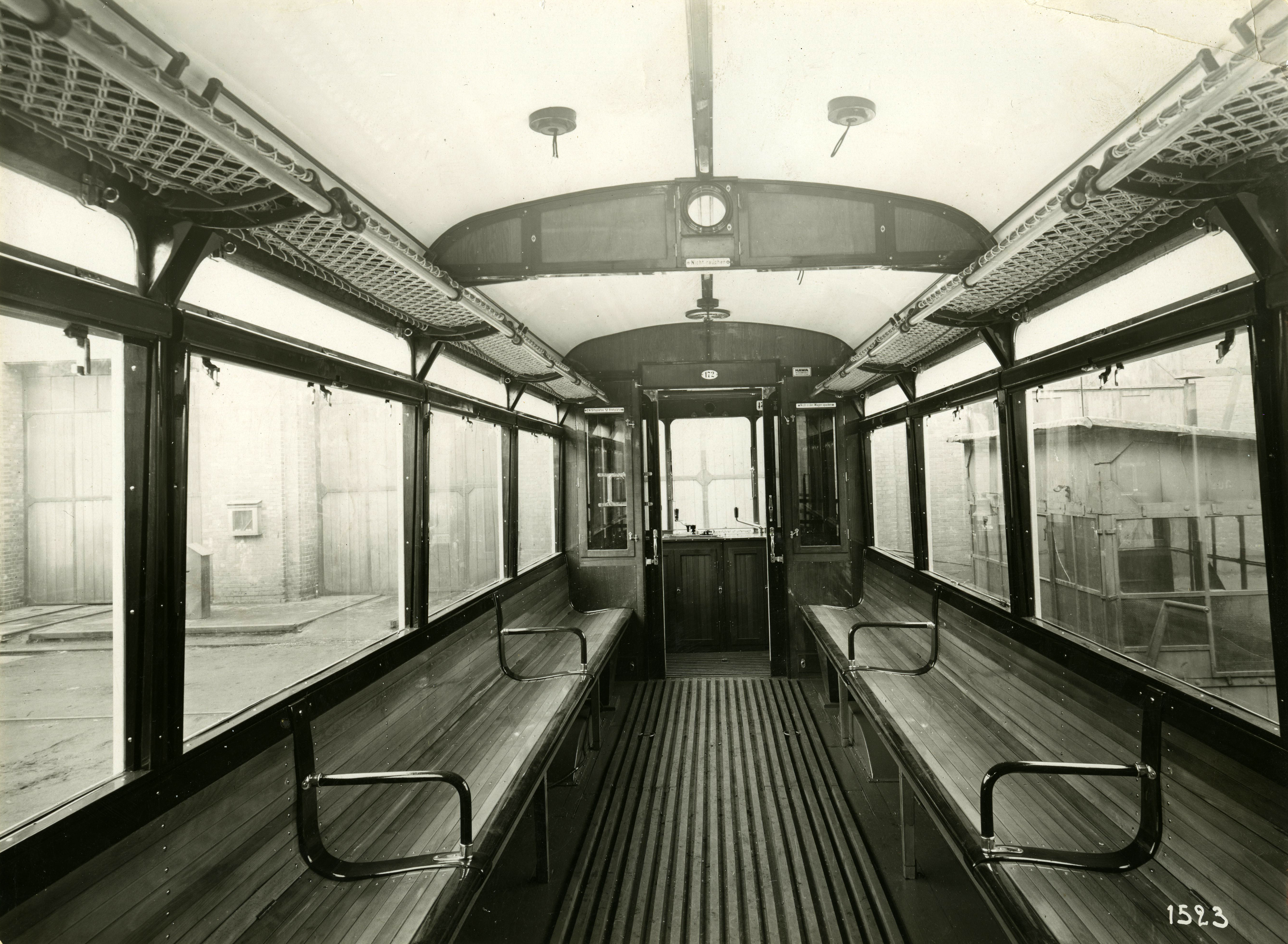 Format: Fotopositiv. Interiøret i en Hawavogntilhenger. Ukjent fotograf og ukjent år.